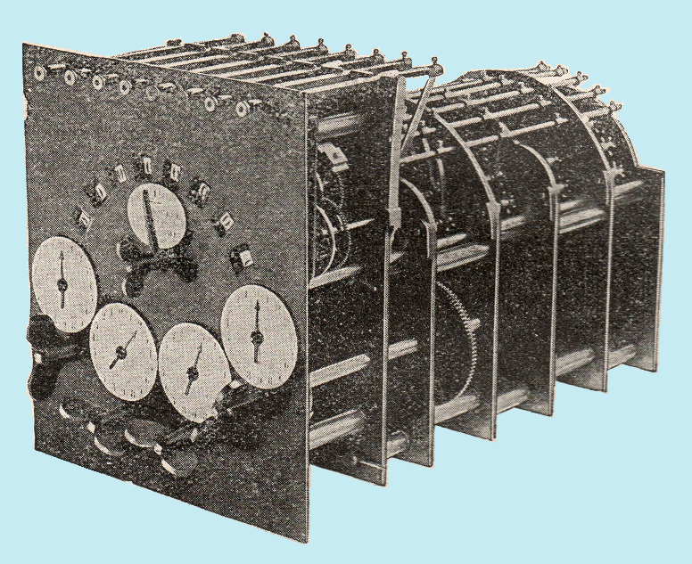 Dessin d'un Arithmaurel